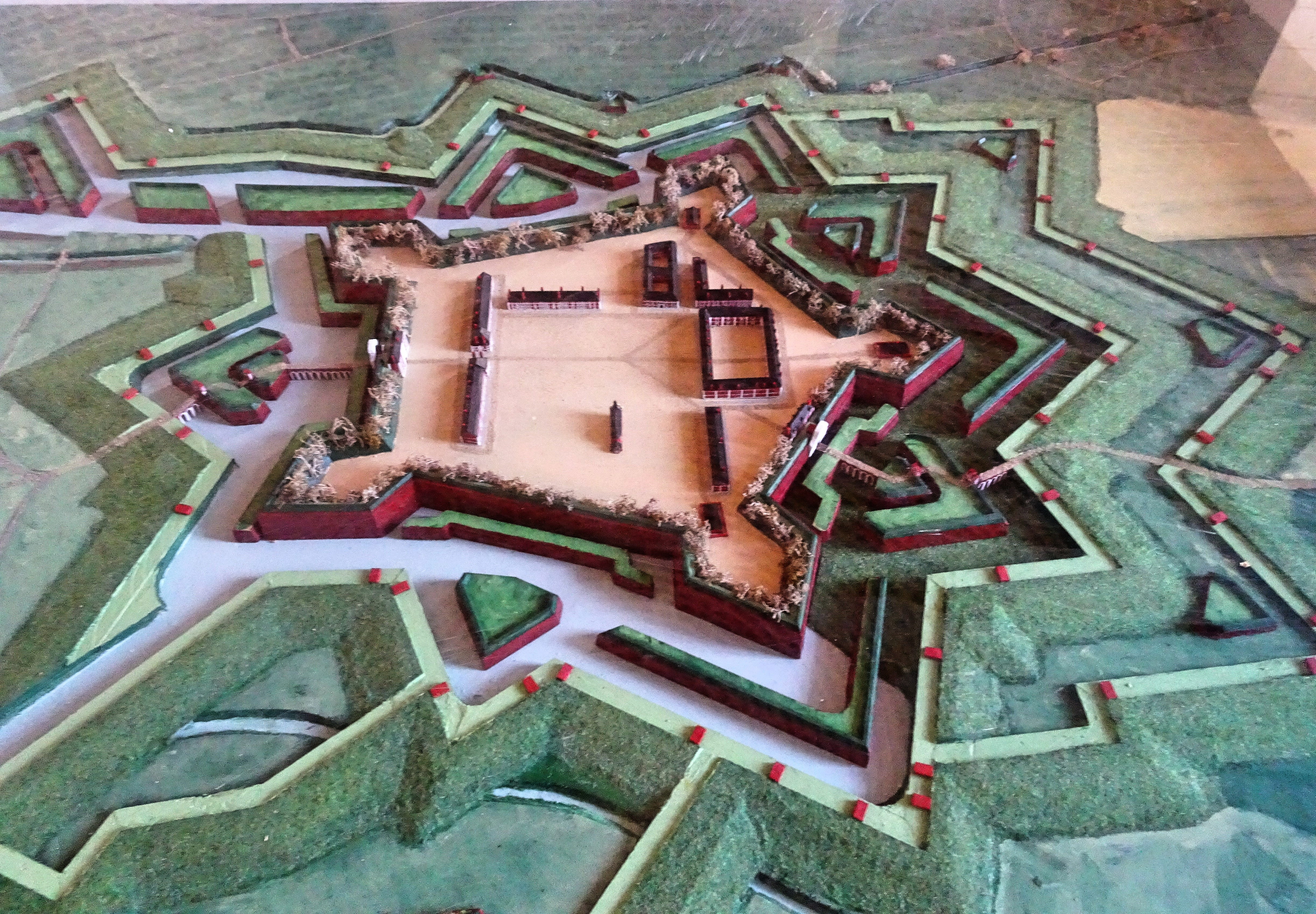 Plan relief de la citadelle Vauban - Ville d'Arras This building is en partie classé, en partie inscrit au titre des Monuments Historiques. .